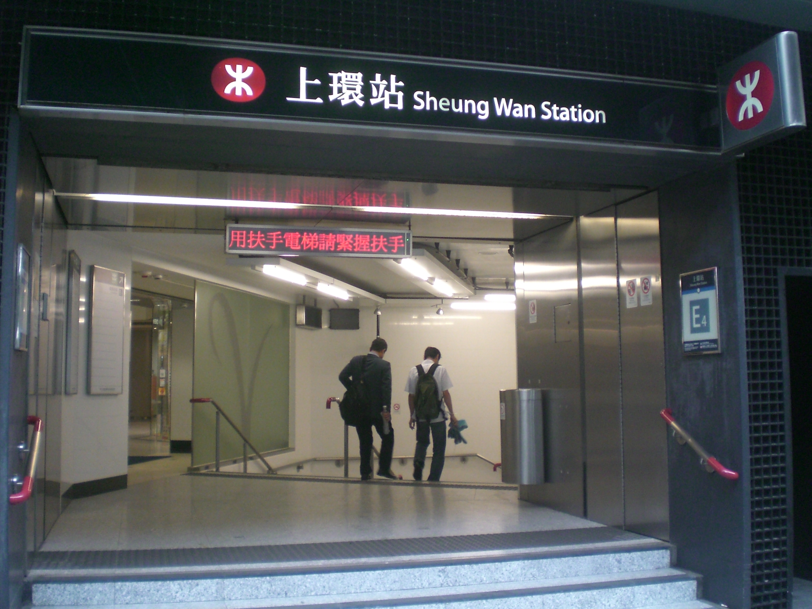 干諾道中維德廣場zh:港鐵上環站E4出口